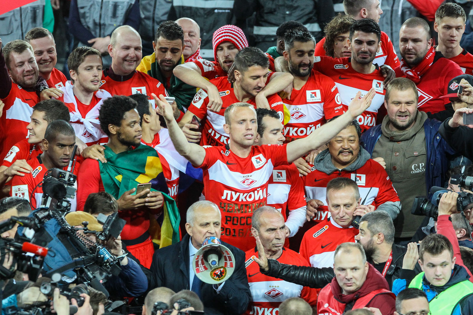 Празднование чемпионства московского «Спартака» в матче «Спартак» — «Терек»